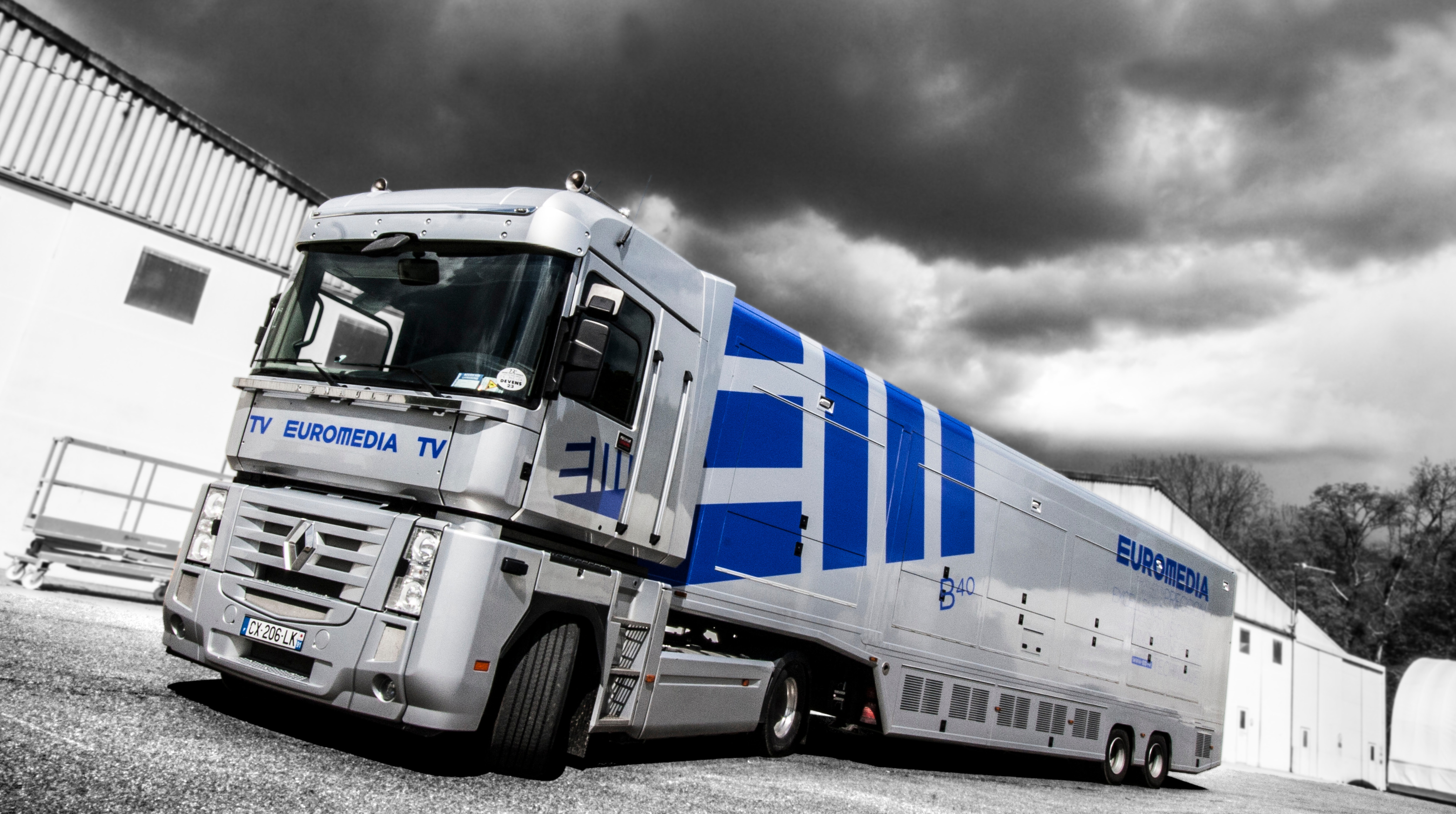 car régie